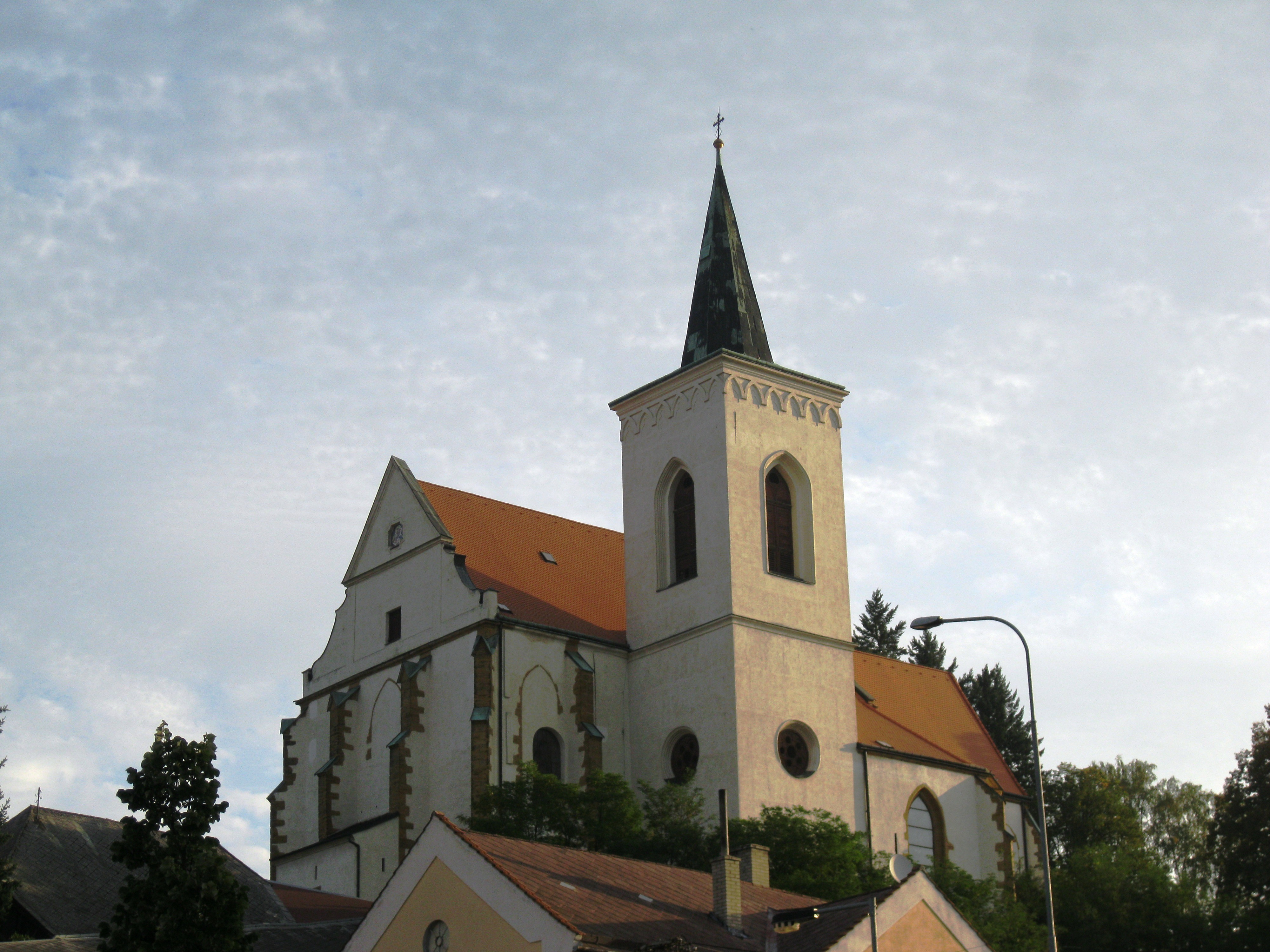 Kostel sv. Prokopa (Letovice)